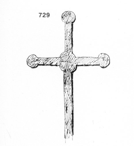 729. Кръст-акротерия над портите на оградата около двора на църквата „Св. Богородица" в с. Лопатица, Битолско. Изкован от желязо; четири­крилен; горните три крила завършват с кръгове; крилата излизат от кръга. Размери: 25x15x1 см. Кръстът е работен през време на зидането на оградата, през 1882 г. Скициран на. 30.XII.1915 г. (Т. 7, обр. 9.)